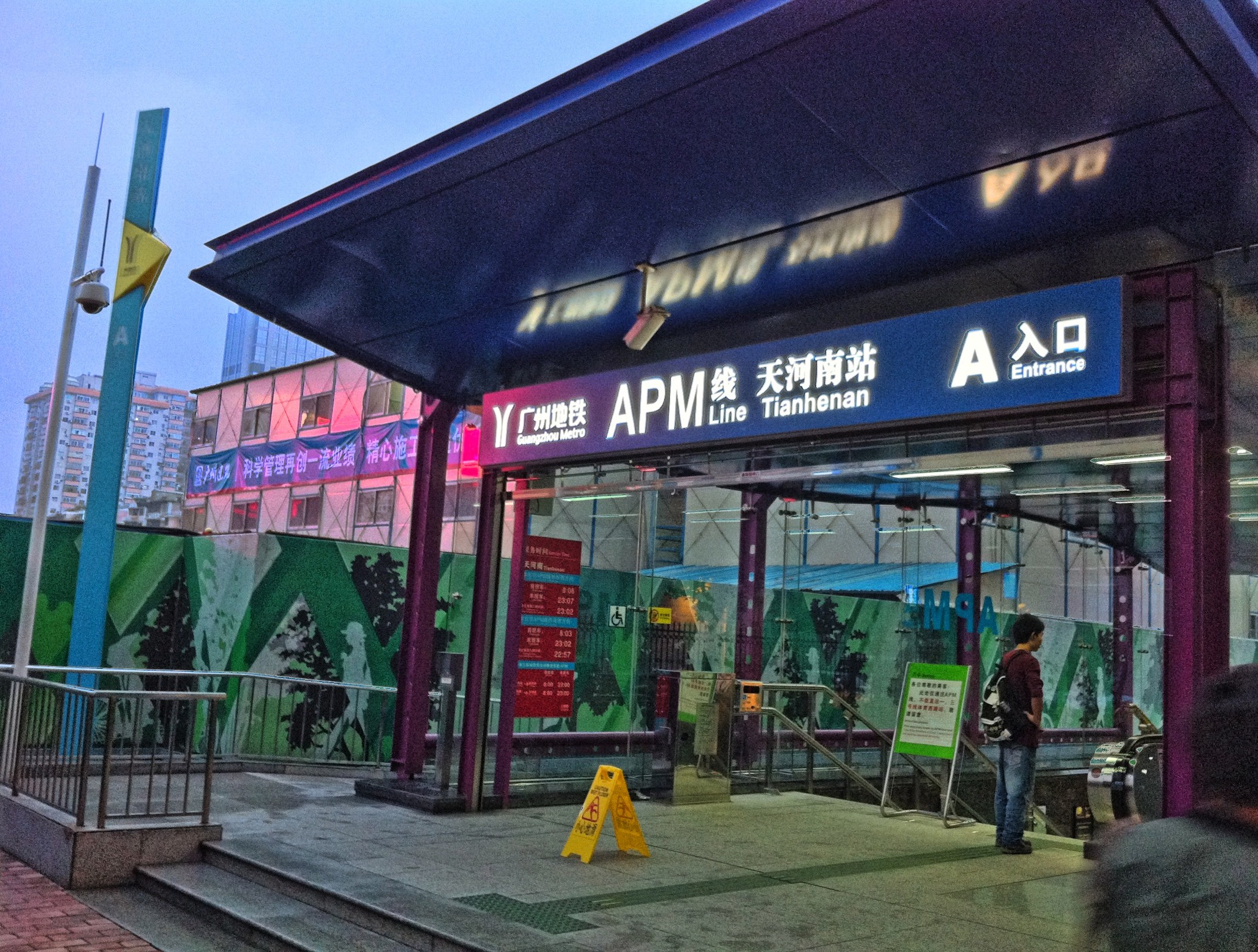 珠江新城旅客自动输送系统天河南站A出口